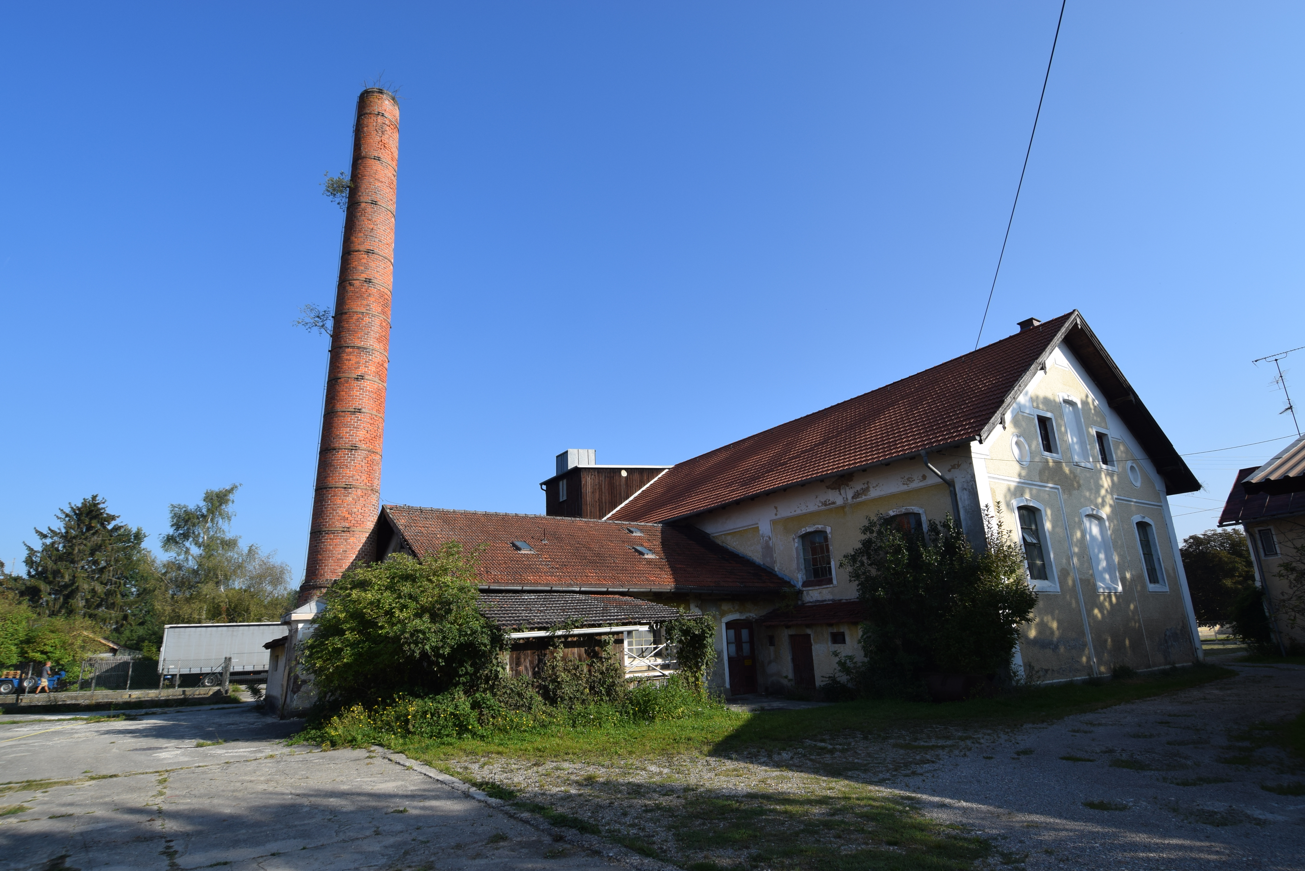 Gut Freiham, Schnapsbrennerei, Ansicht von Südwesten